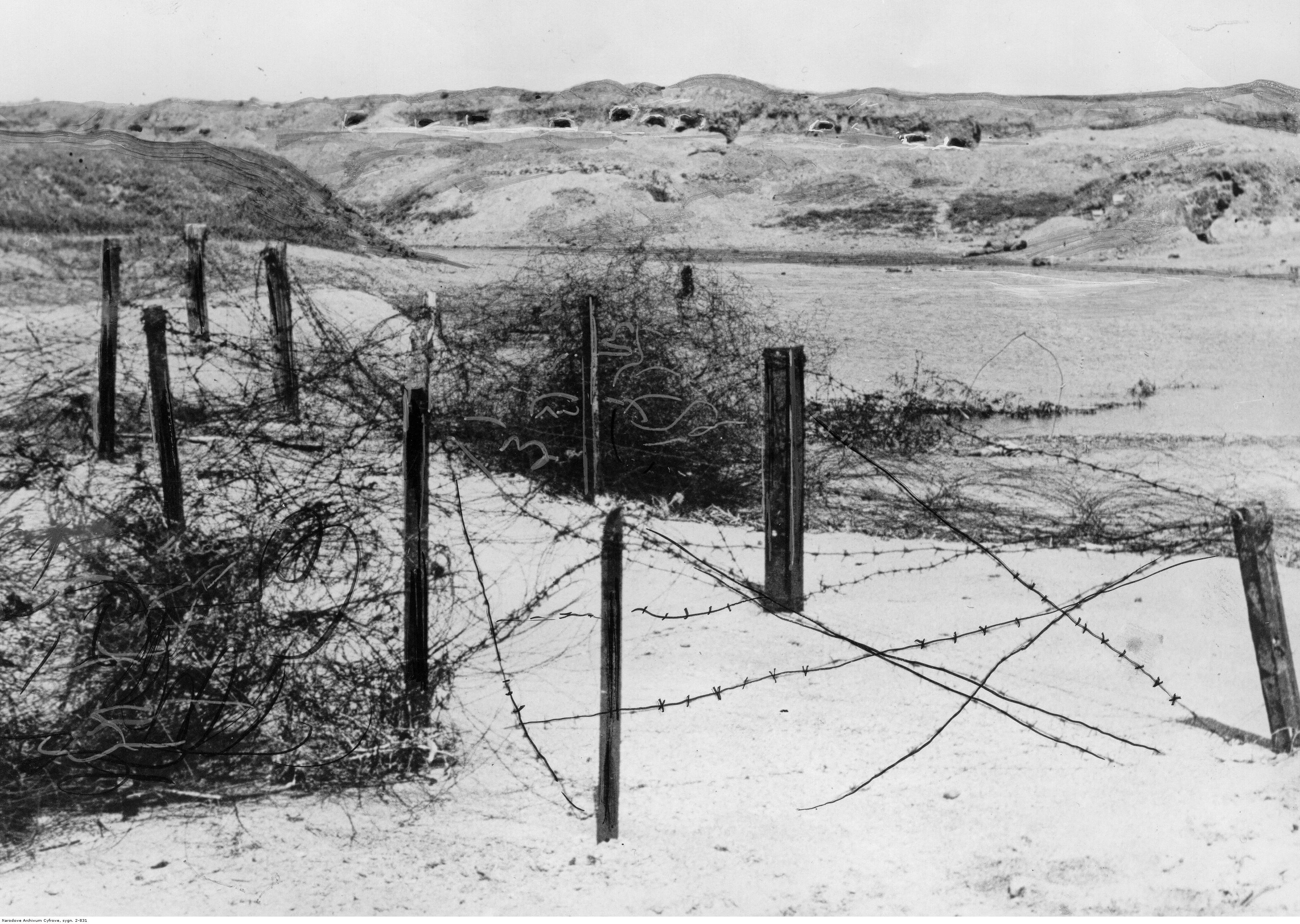 Radzieckie umocnienia i zasieki na półwyspie Kercz.